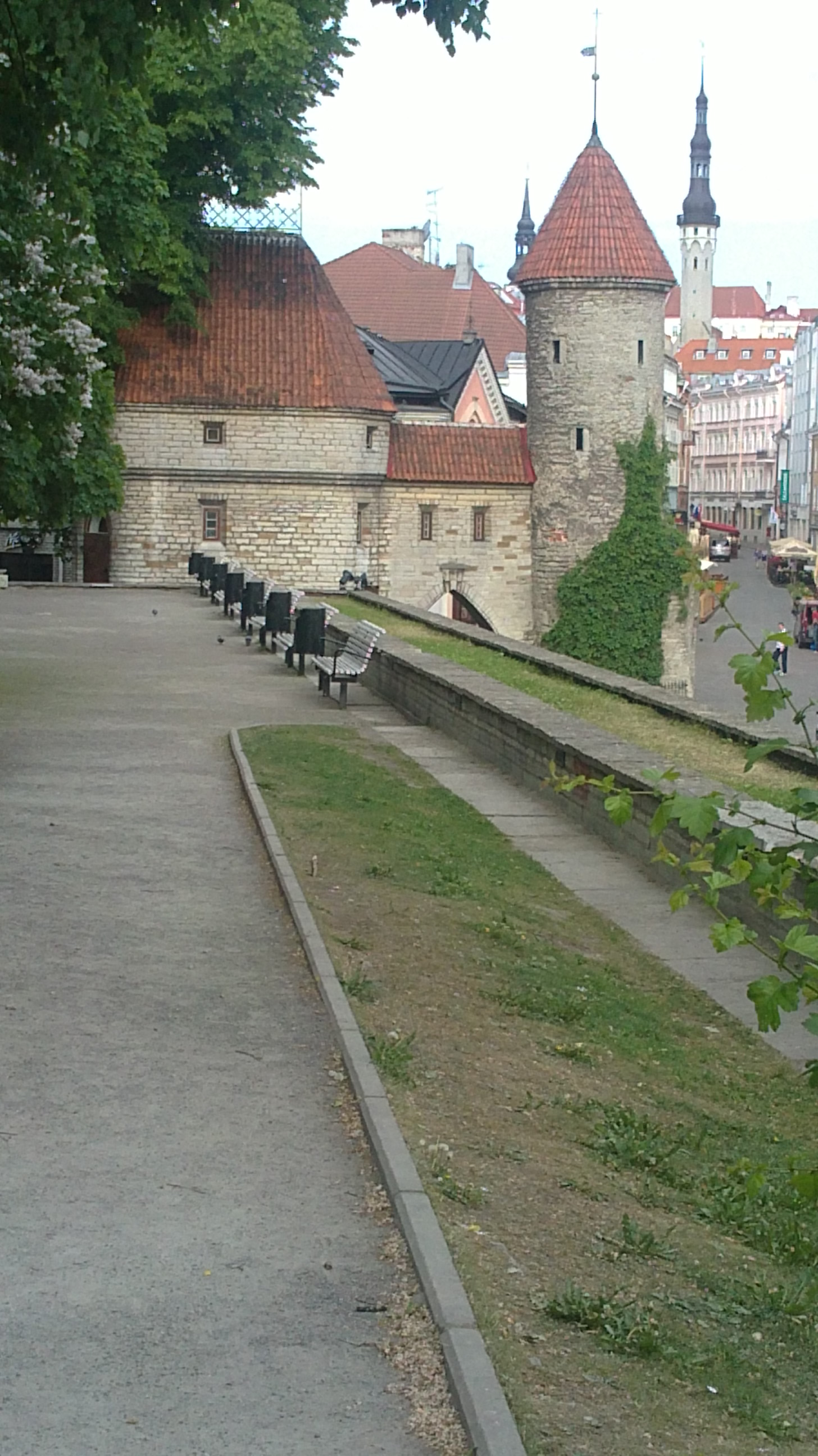 Vaade Virumäelt Viru värava eesvärav ja Viru tänavale ning Tallinna vanalinnale